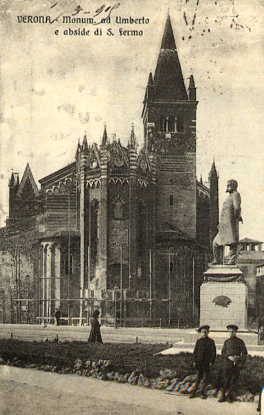 San Fermo e il monumento a re Umbero a Verona in una foto d'epoca